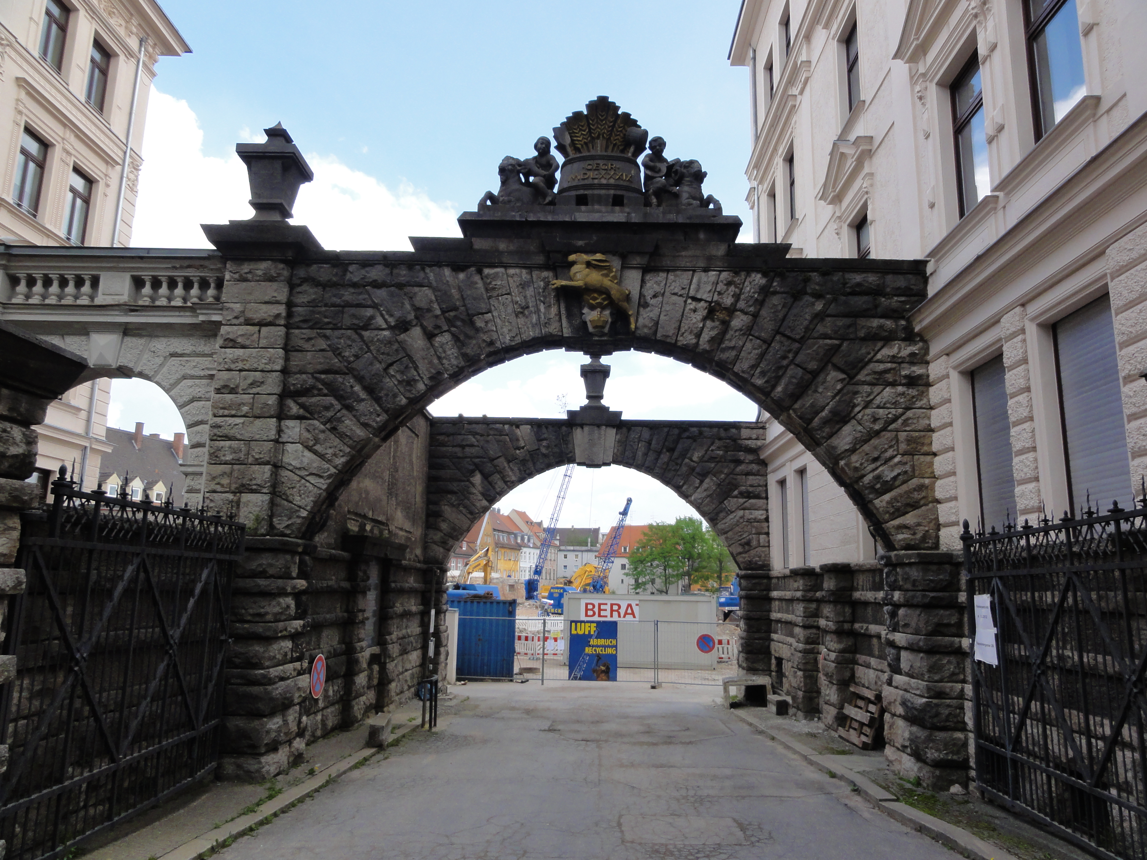 Augsburg, Germany